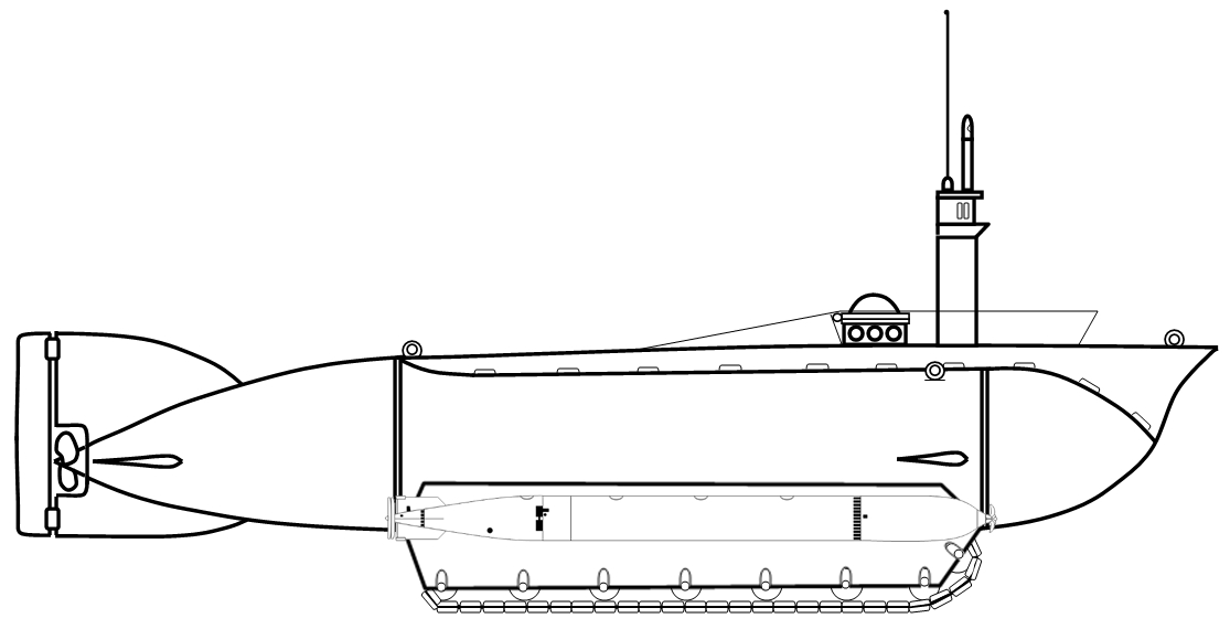 Seitenprofil des deutschen Kleinst-U-Bootes "Seeteufel" (1945)